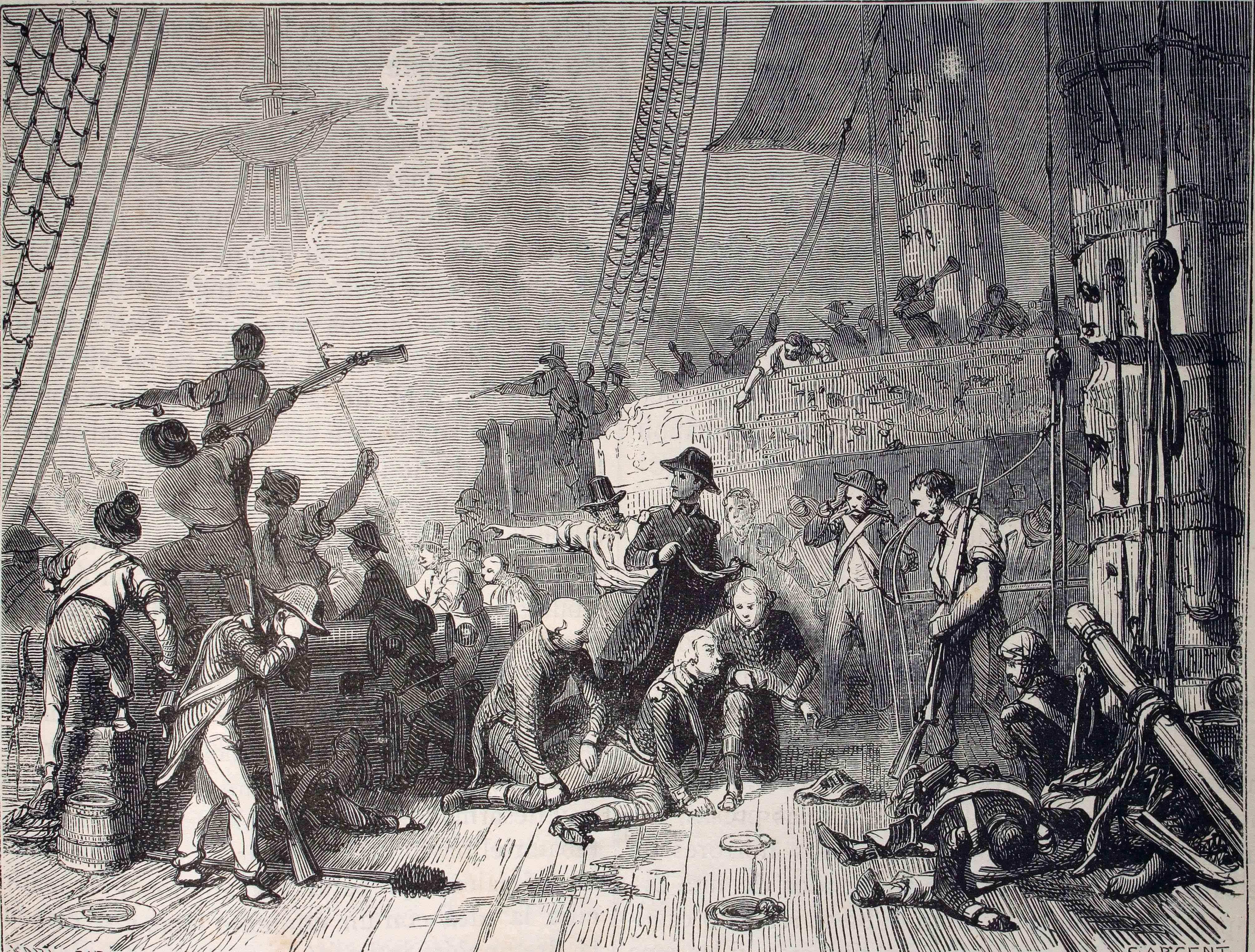 "Muerte del contraalmirante Magon". Ilustraciones de la obra : Historia del Consulado y del Imperio : continuación de la historia de la Revolución Francesa / por A. Thiers. - Barcelona : Montaner y Simón, 1879